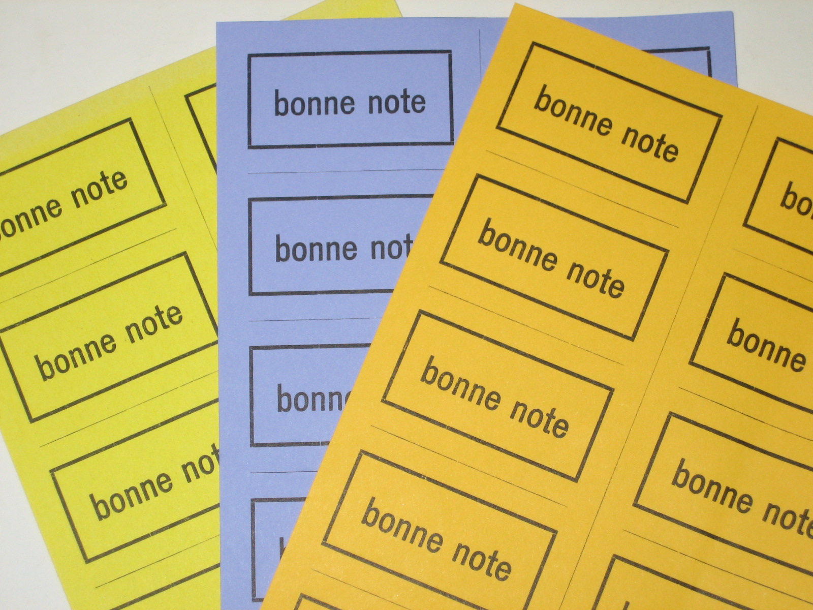 Bonne-notën - Drockbéi fir d'Léierpersonal. selwer gemaach am Mee 2006; dës Béi sinn am spezialiséierte Commerce nach haut ze fannen.